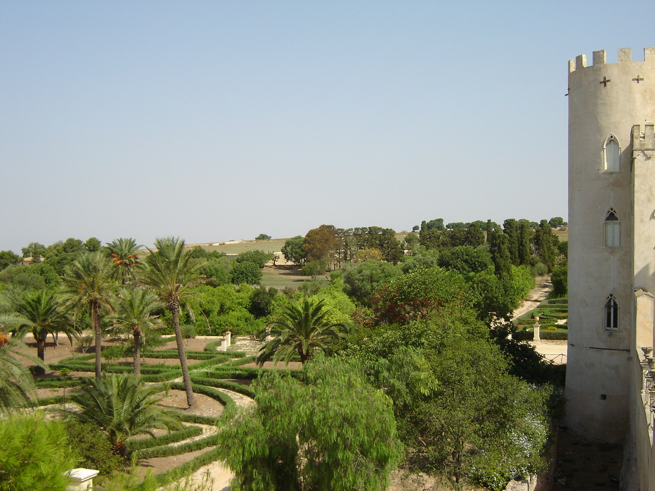 Vista del parco dal castello.